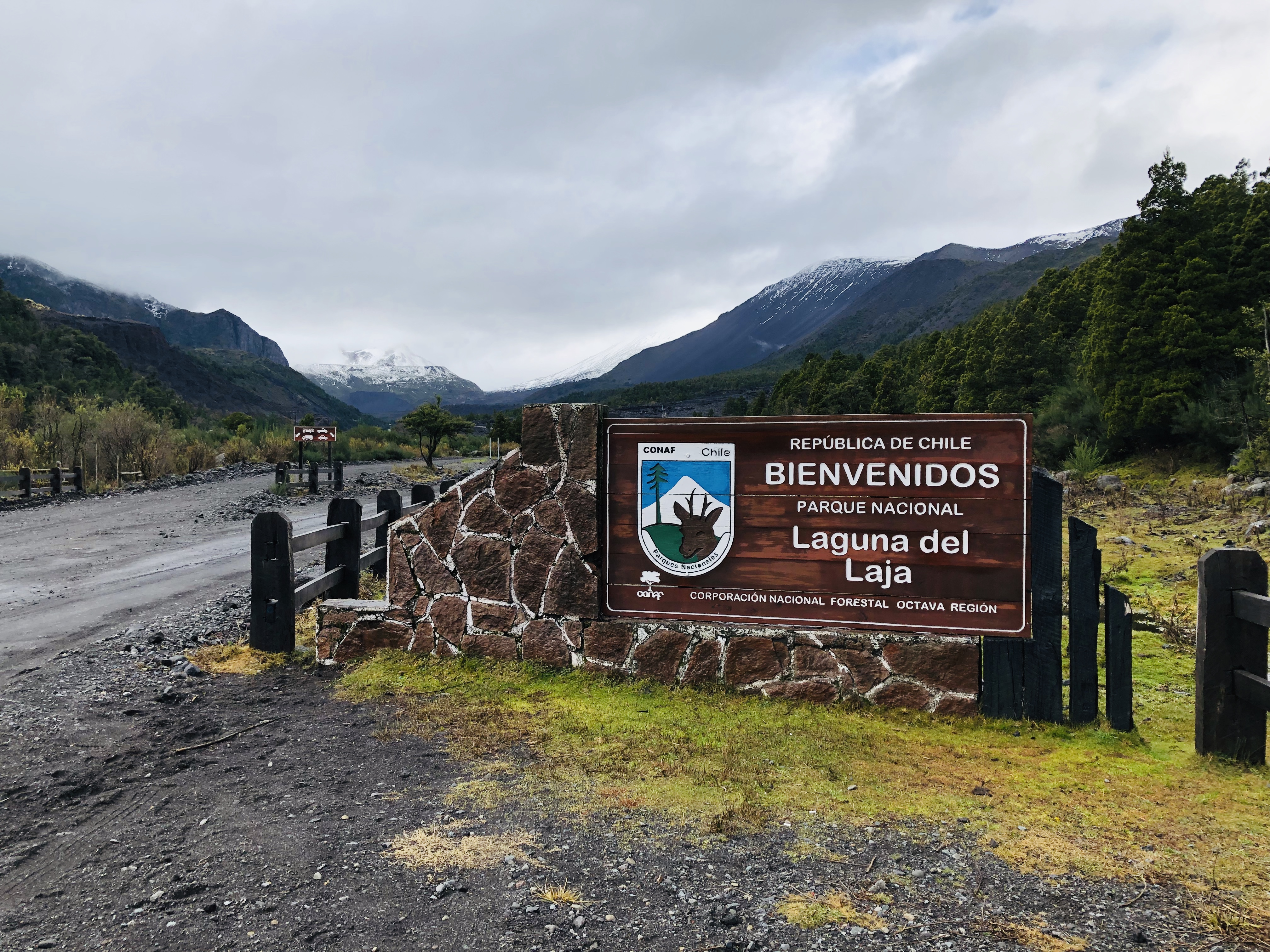 Parque nacional Laguna del Laja